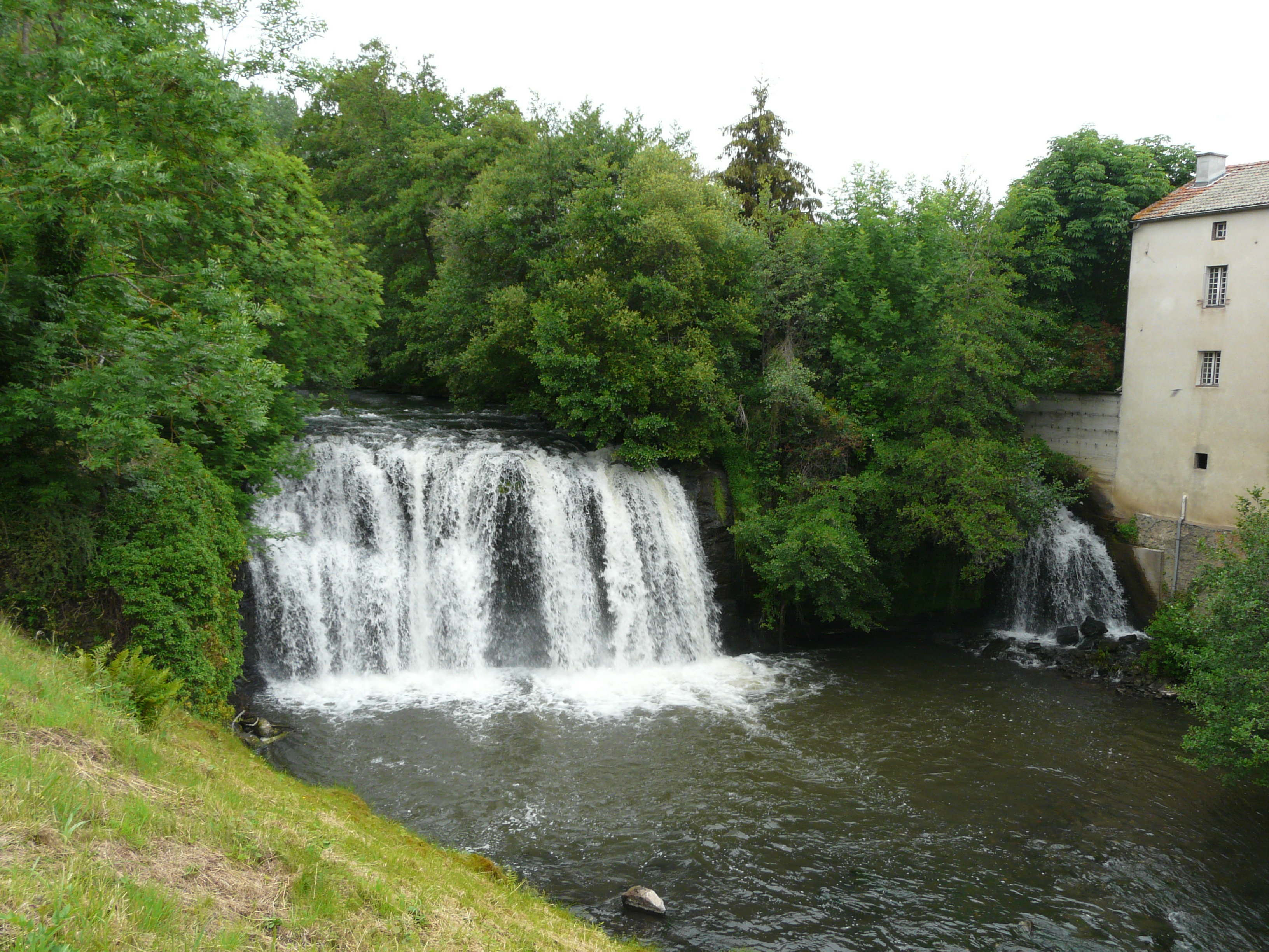 La cascade de Saillant sur la Couze Chambon, Saint-Nectaire, Puy-de-Dôme, France.